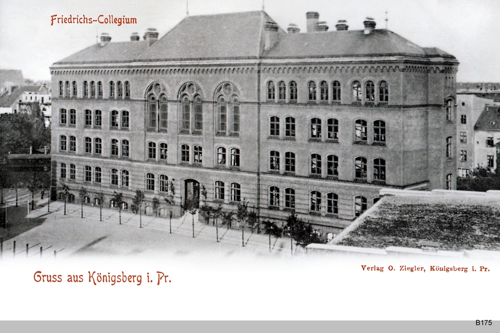 Königsberg